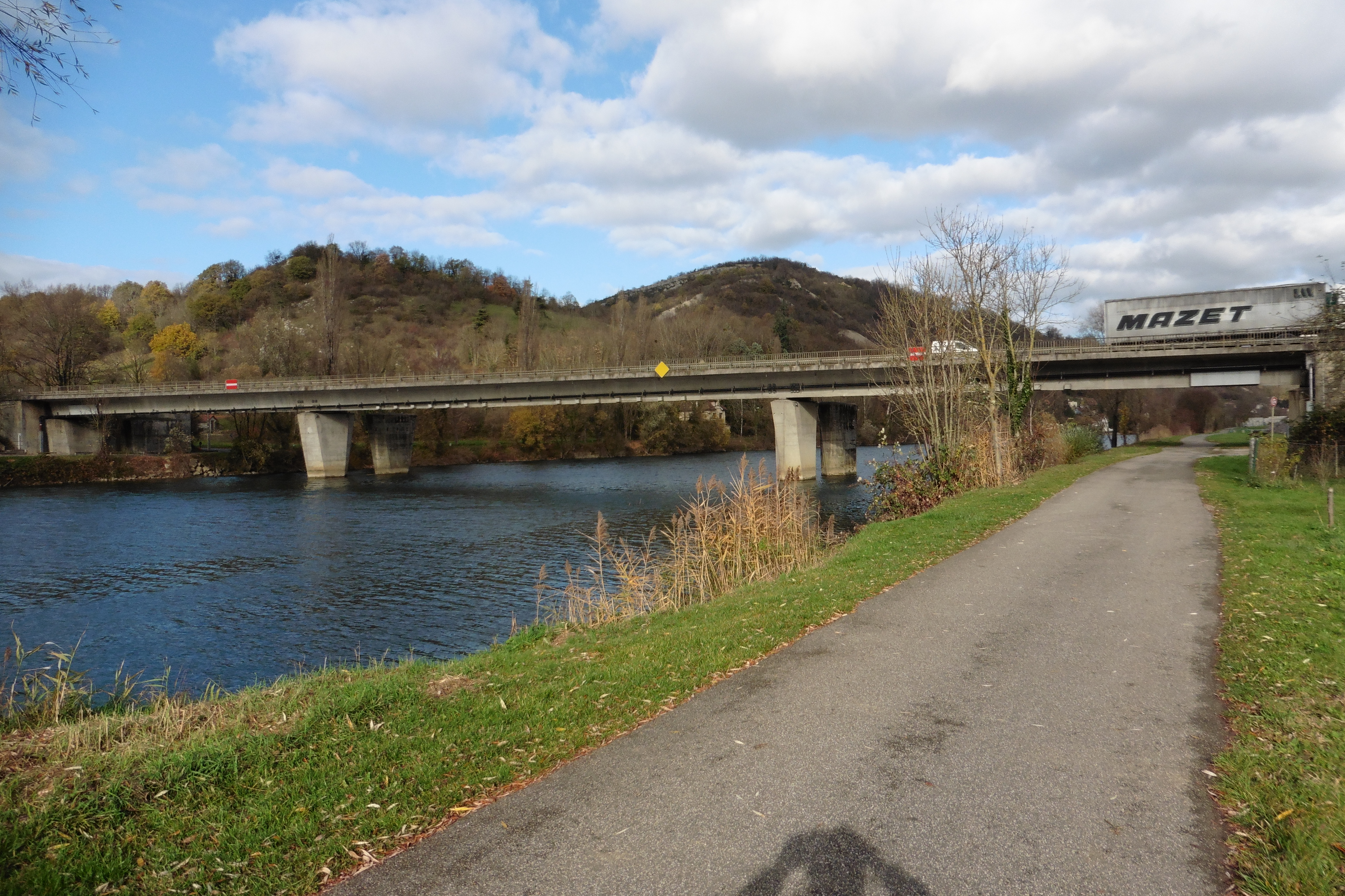 Ponts